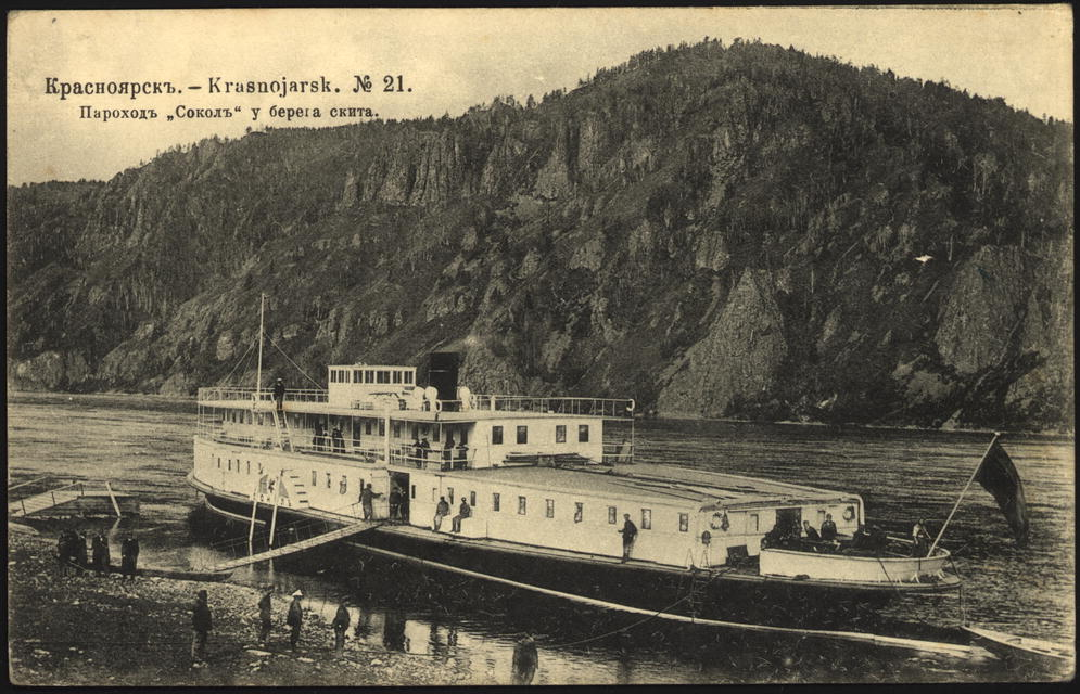 Пароход Сокол у пристани Знаменского скита (ныне Дивногорск). Пароход принадлежал купцу Гадалову. Курсировал на линии Красноярск-Минусинск. Открытка 1904 года.